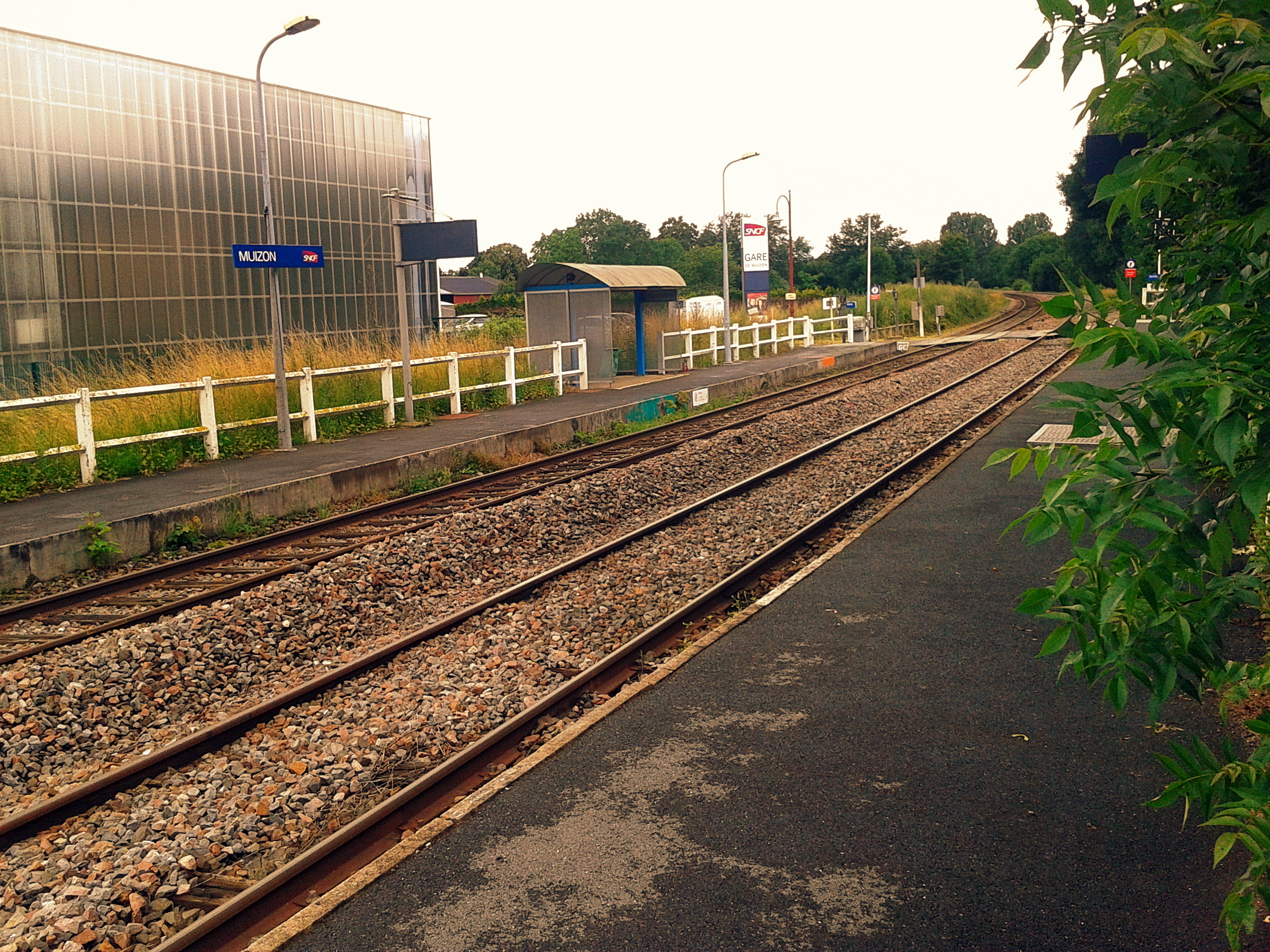 Gare de Muizon